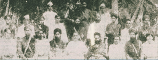 അകാലിസംഘം വൈക്കം സത്യാഗ്രഹപ്പന്തലിൽ